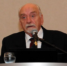 Milton Cairoli, Ex Juez de la Suprema Corte de Justicia